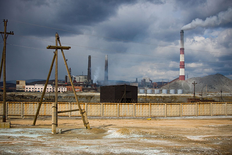 Медеплавильный завод